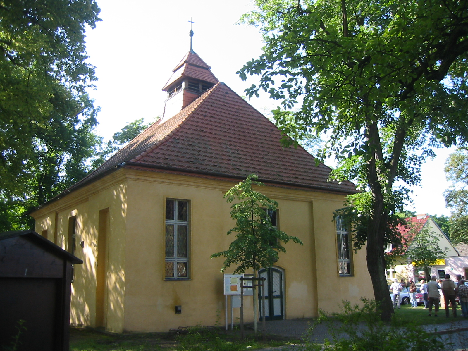 Dorfkirche Müggelheim aus dem 18. Jahrhundert auf dem Anger in Berlin-Müggelheim